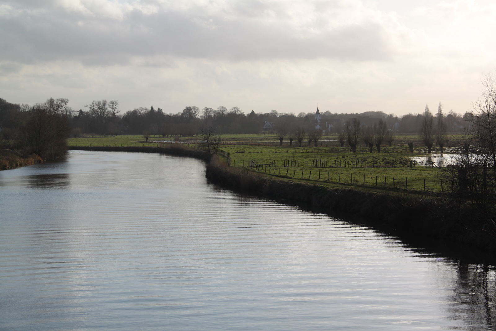 Leie bij Afsnee